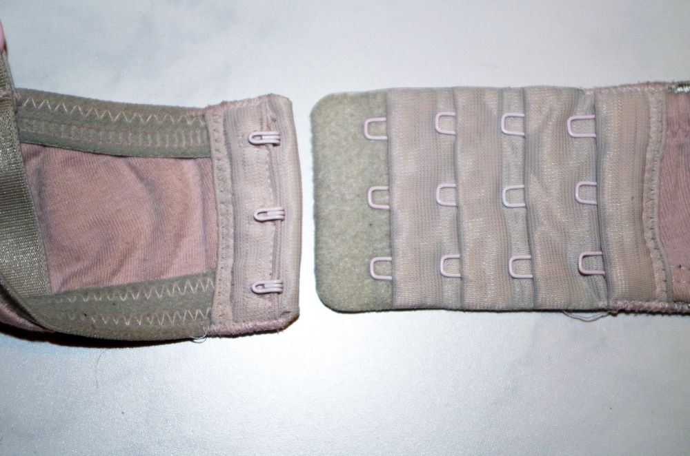 Dreifacher Hakenverschluss an einem Büstenhalter